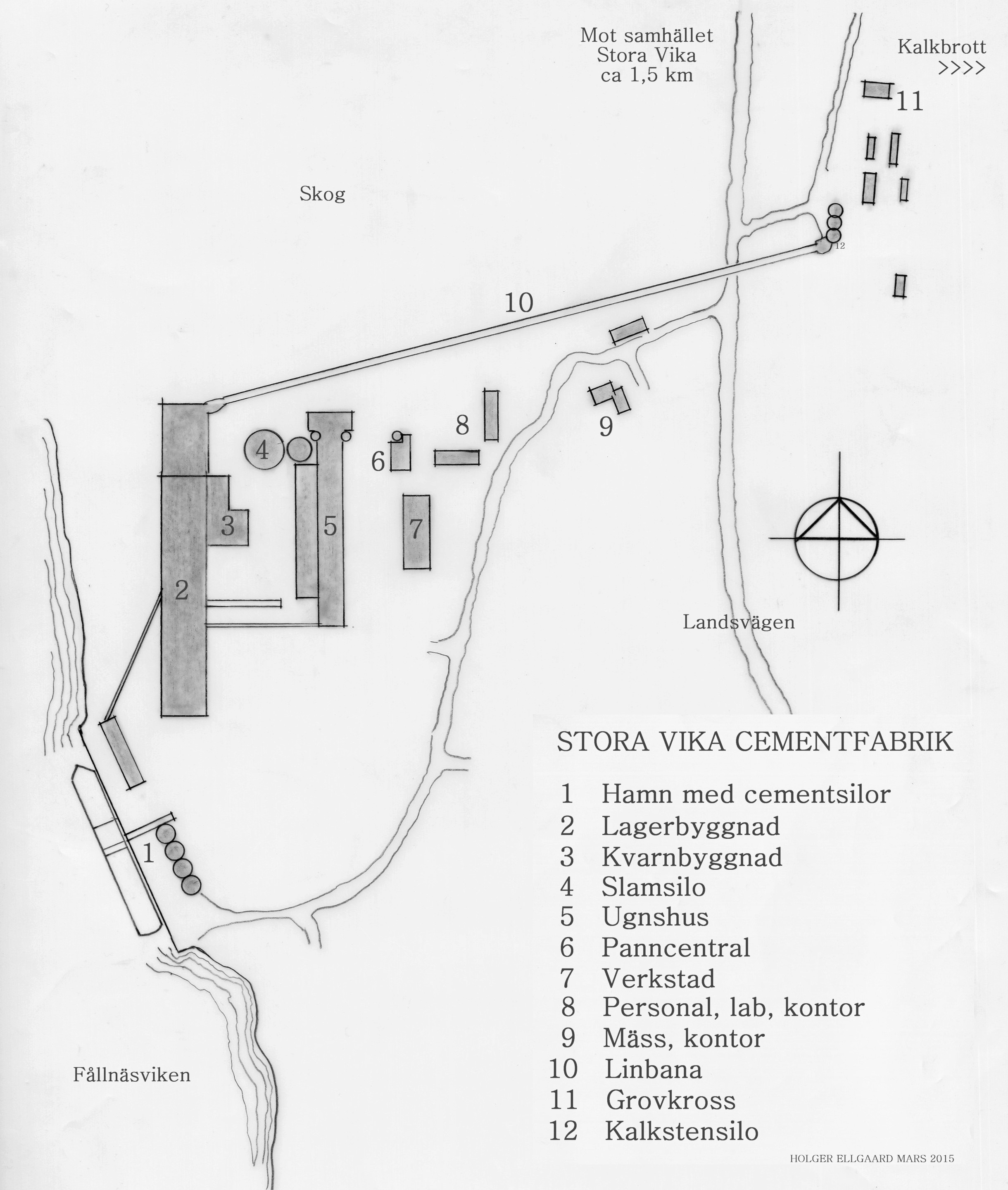 Plan över Stora Vika cementfabrik (källa: Rosander, Lennart (2010). Cement Stora Vika – industriort i folkhemmet.)